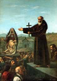 Riproduzione della donazione fatta dal Beato Angelo d'Acri, nel 1700 al popolo di Acri. Attuale affresco presente nella volta della Basilica, realizzato nel 1889.